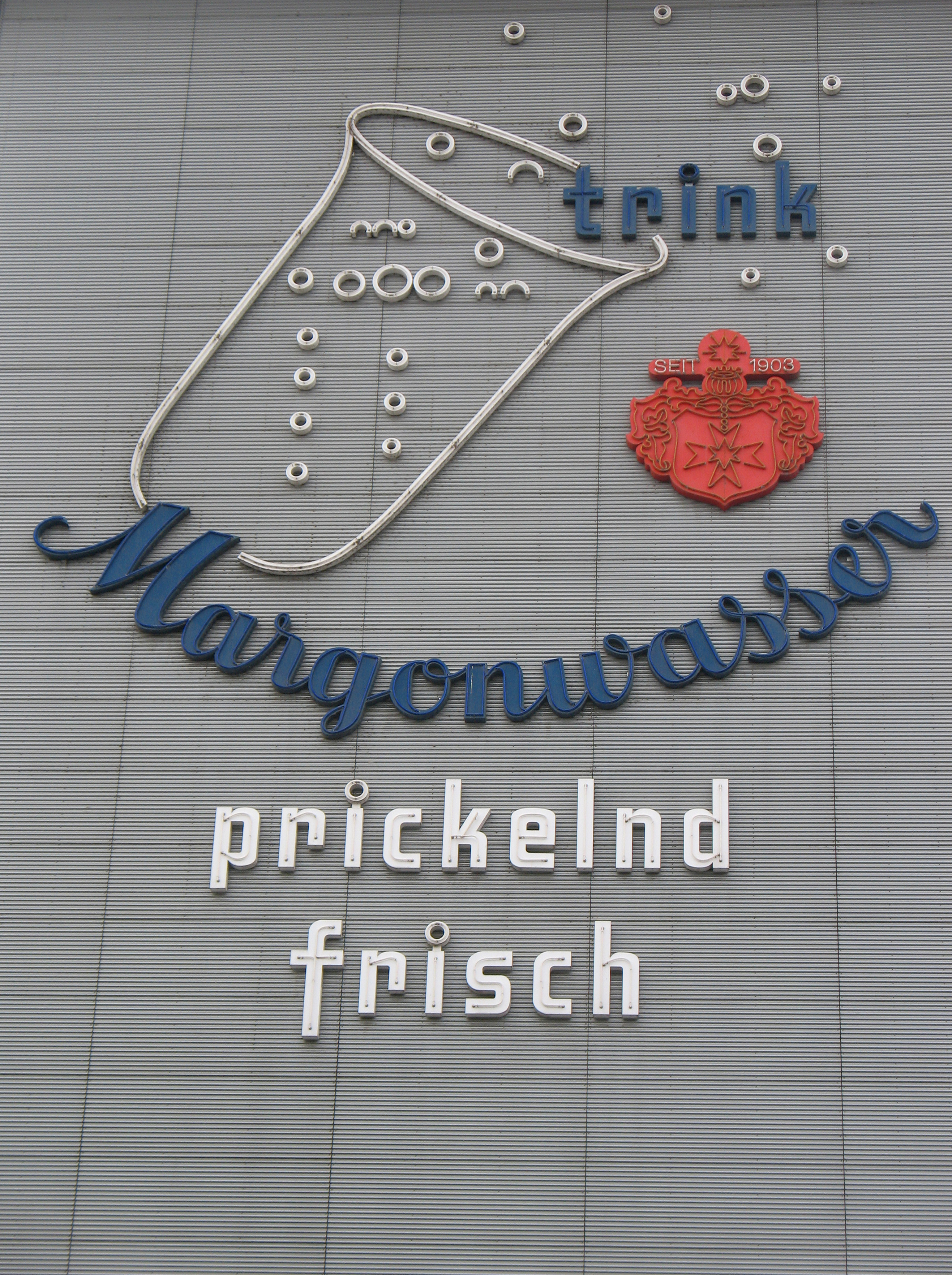 + 00000000001_Image_Alte DDR Werbeanlage Margonwasser - DDR Hochhaus in Dresden